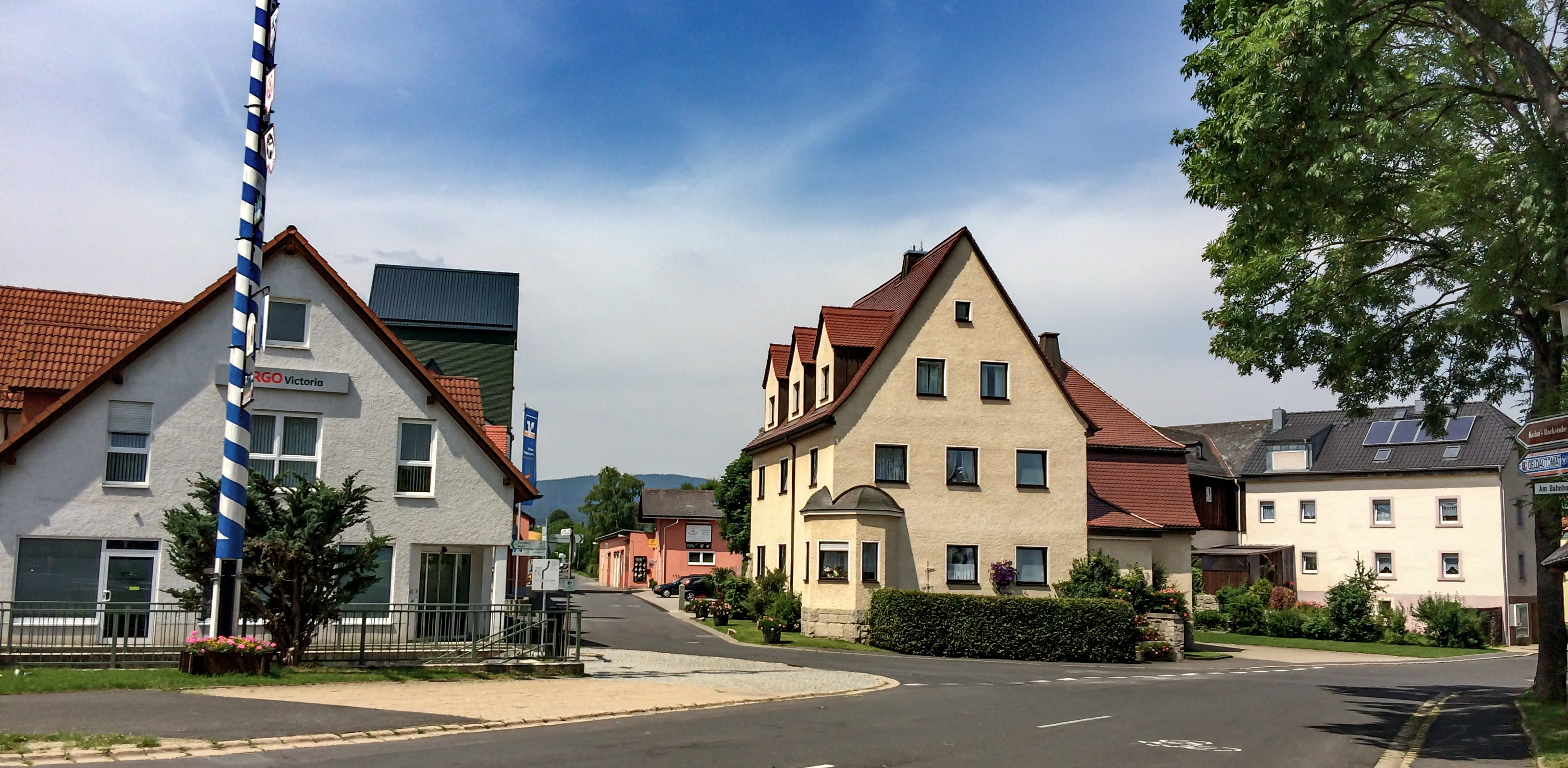 Tröstau Zentrum Am Bahnhof, Juli 2014